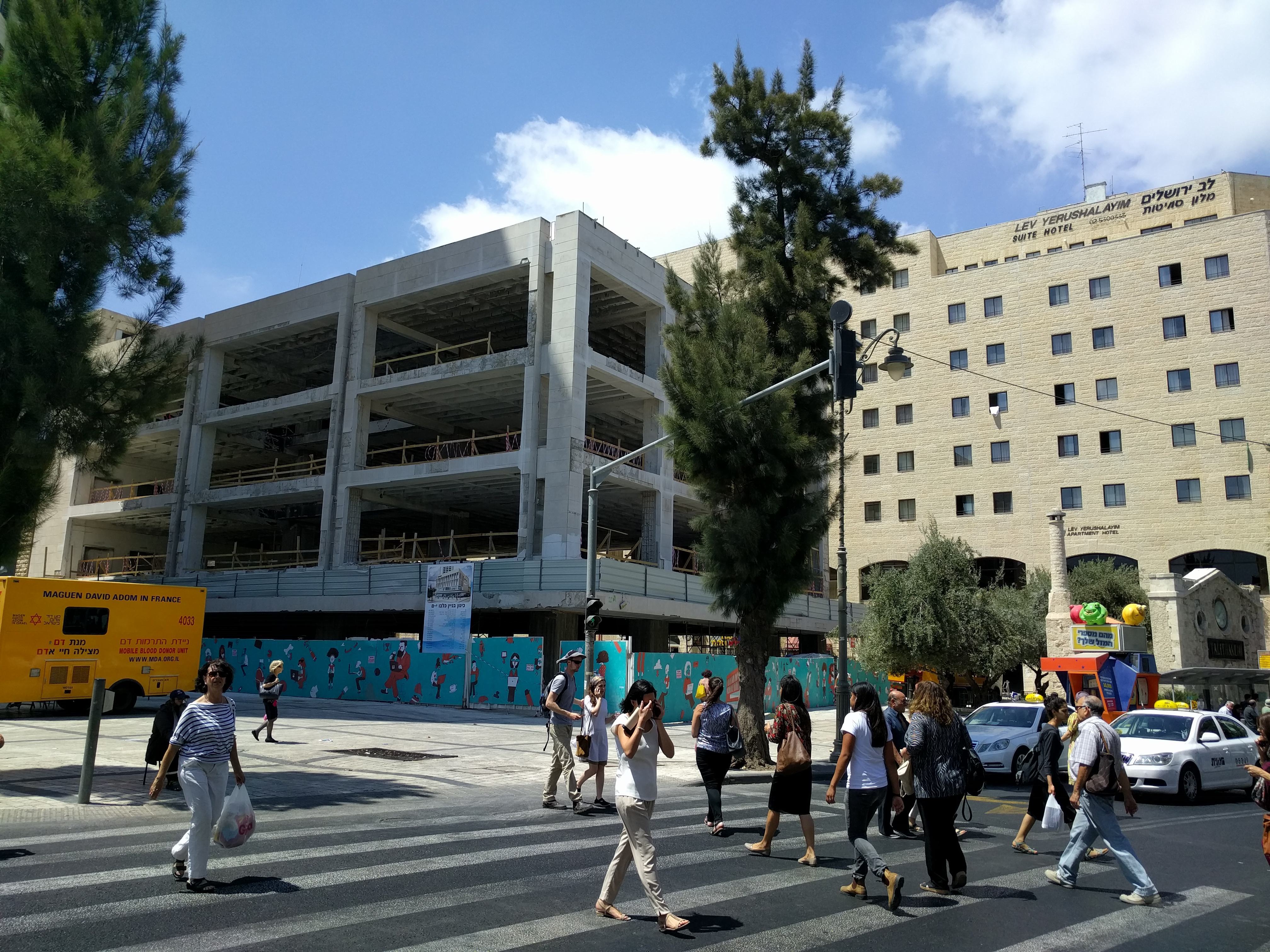 בניין המשביר לצרכן, רחוב המלך ג'ורג' 28 ירושלים. שיפוצים בבניין בסוף יולי 2016